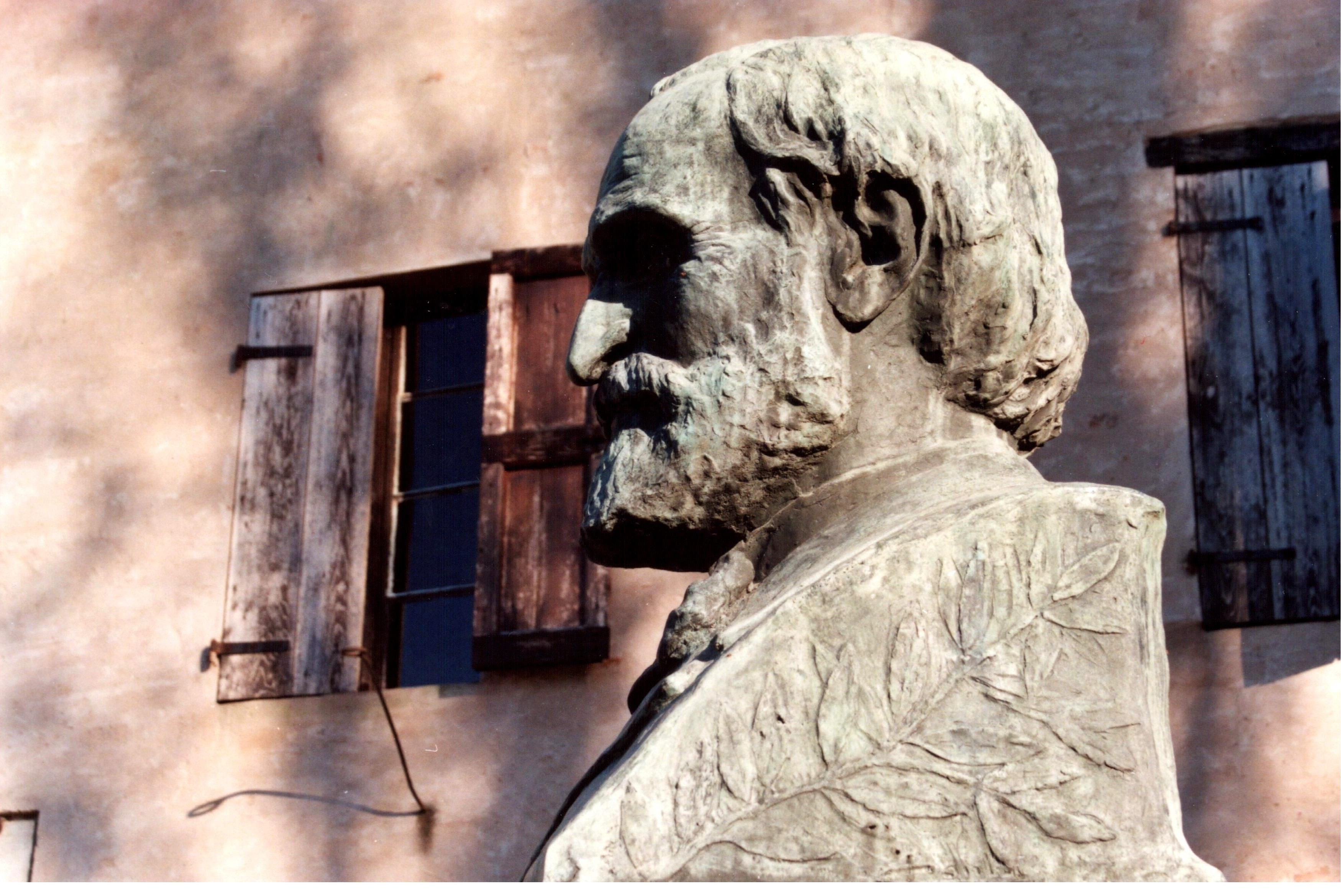 Casa natale di G. Verdi busto del Maestro all'esterno della casa This is a photo of a monument which is part of cultural heritage of Italy.